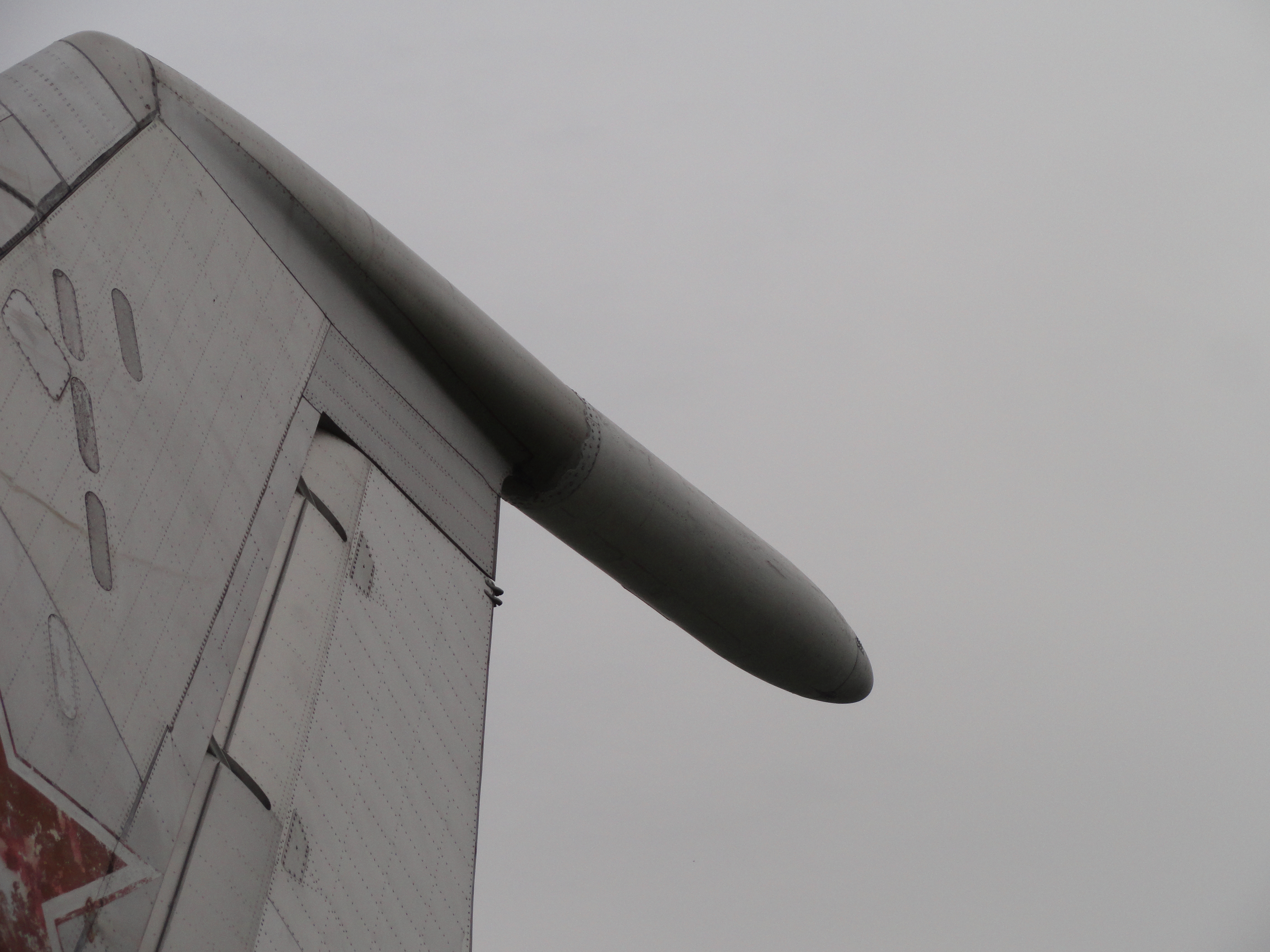 Обтекатель антенны магнитометра «Ладога», в верхней части киля самолёта Ту-142